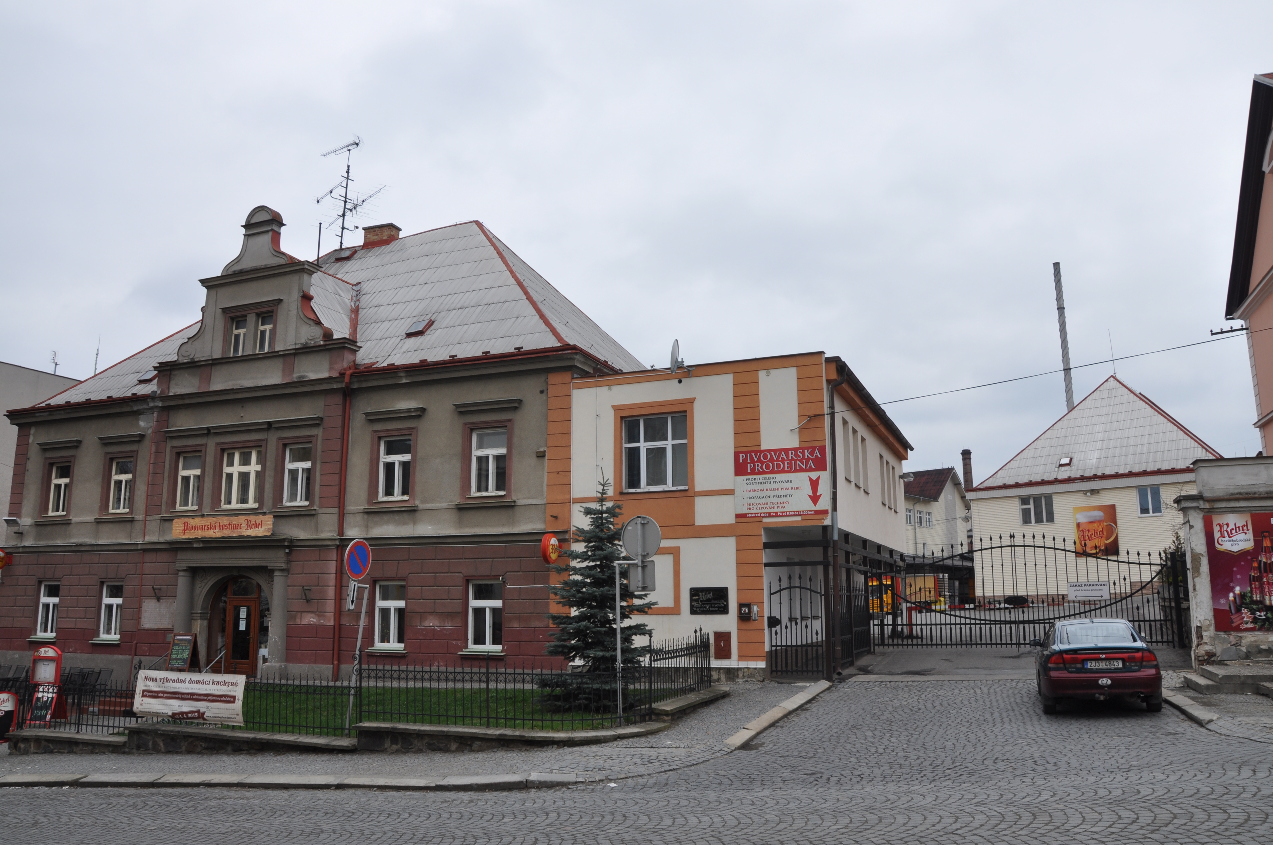 Pivovar Havlíčkův Brod - REBEL (Měšťanský pivovar).Budova vlevo slouží jako Pivovarská restaurace. Ulice Dobrovského. Město Havlíčkův Brod. Kraj Vysočina. Czech Republic. Autor textu Pohled 111